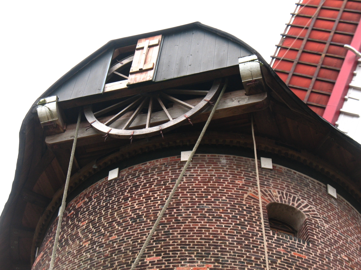 De Stenen Molen te Brecht, provincie Antwerpen